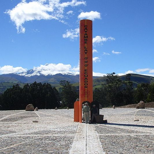 Cayambe, direkt auf dem Äquator, gesehen vom neuen Äquator-Denkmal (Vordergrund), zugleich Gnomon einer Sonnenuhr.